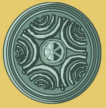 Illyrian shield(Pelte,35 cm diameter,wooden or bronze),Hellenistic era